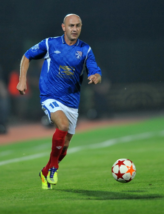 Сергей Юрьевич Назаренко — украинский футболист.